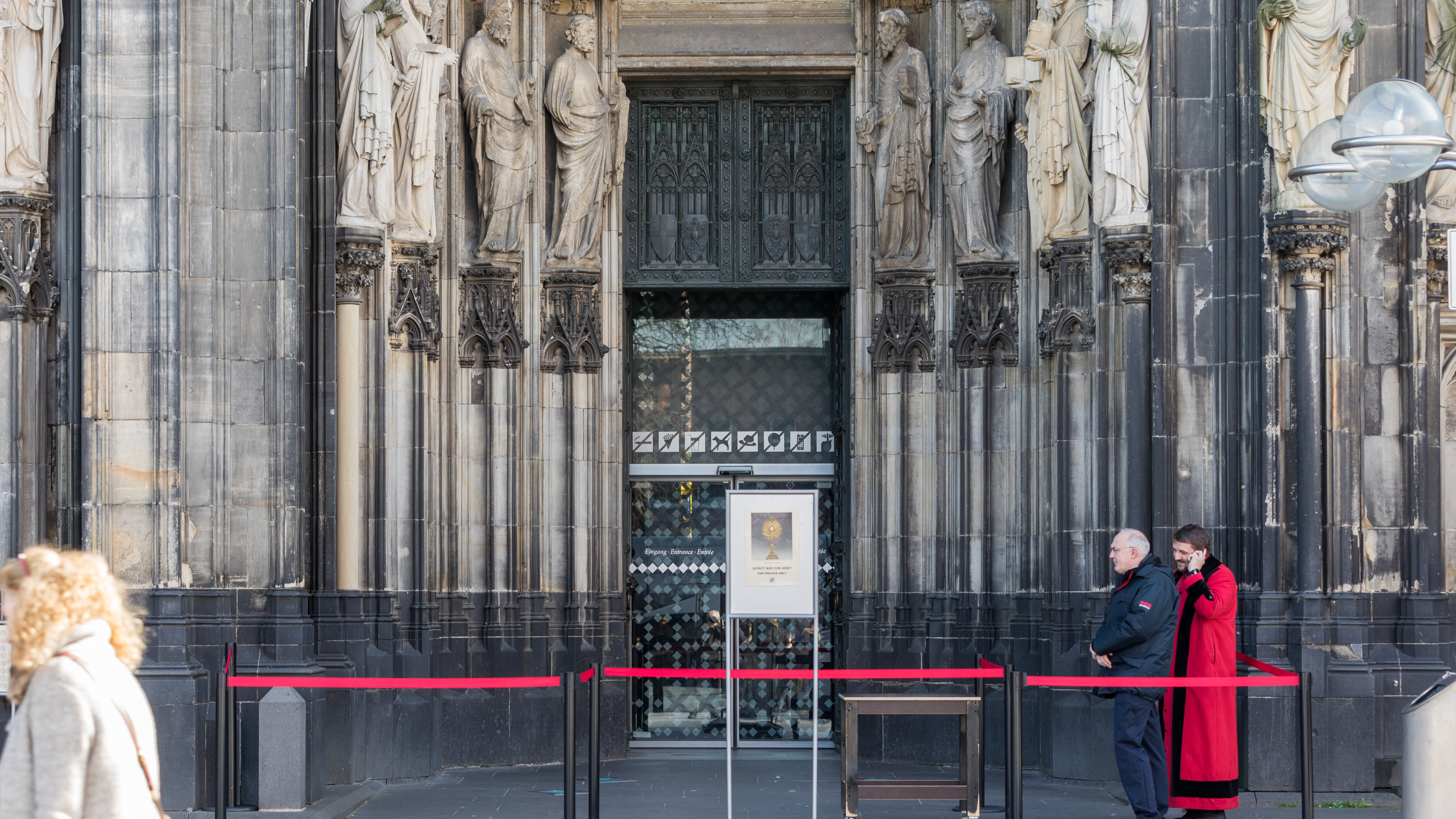 Kölner Dom - offen nur zum Gebet während der COVID-19-Pandemie